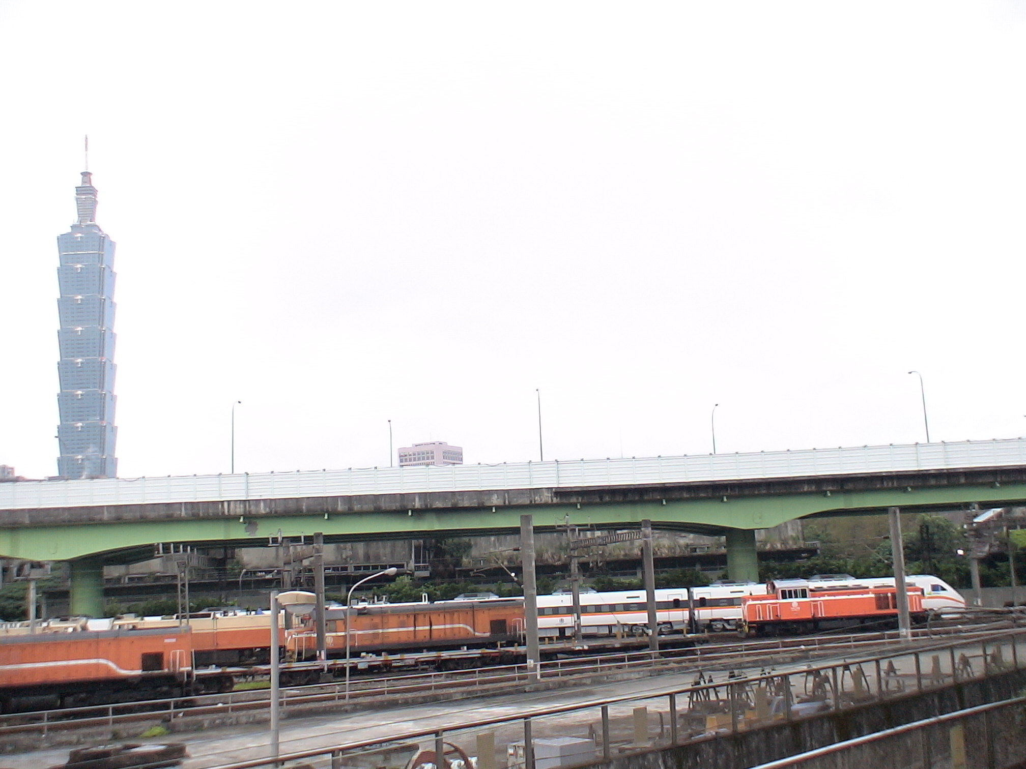 臺北機廠停放太魯閣號列車